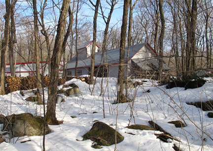 Cabane à sucre à Pont-Rouge, MRC de Portneuf, Québec, Canada.